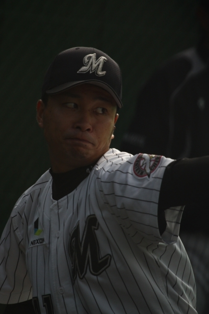 日本プロ野球 千葉ロッテマリーンズ 小林敦投手